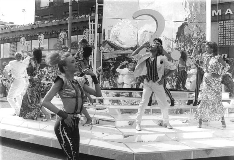 ADN-ZB Mittelstädt 4.7.87 Berlin: Jubiläum-Festumzug. Im großen Festumzug durch das Stadtzentrum anläßlich des 750jährigen Stadtjubiläums stellte das Ballett des DDR-Fernsehens die Hauptstadt als kulturelles Zentrum vor.